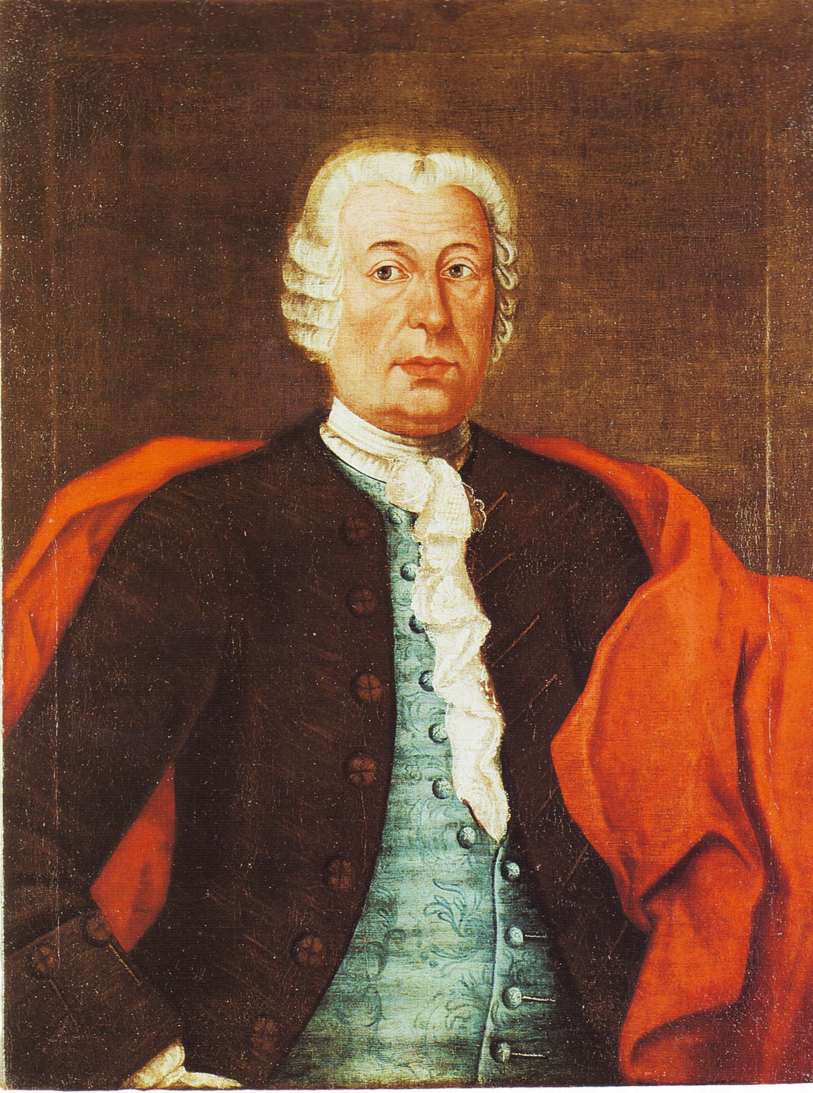 Everhard Kannegießer (1708-1763) (Gemälde Öl auf Leinwand 88x69cm)